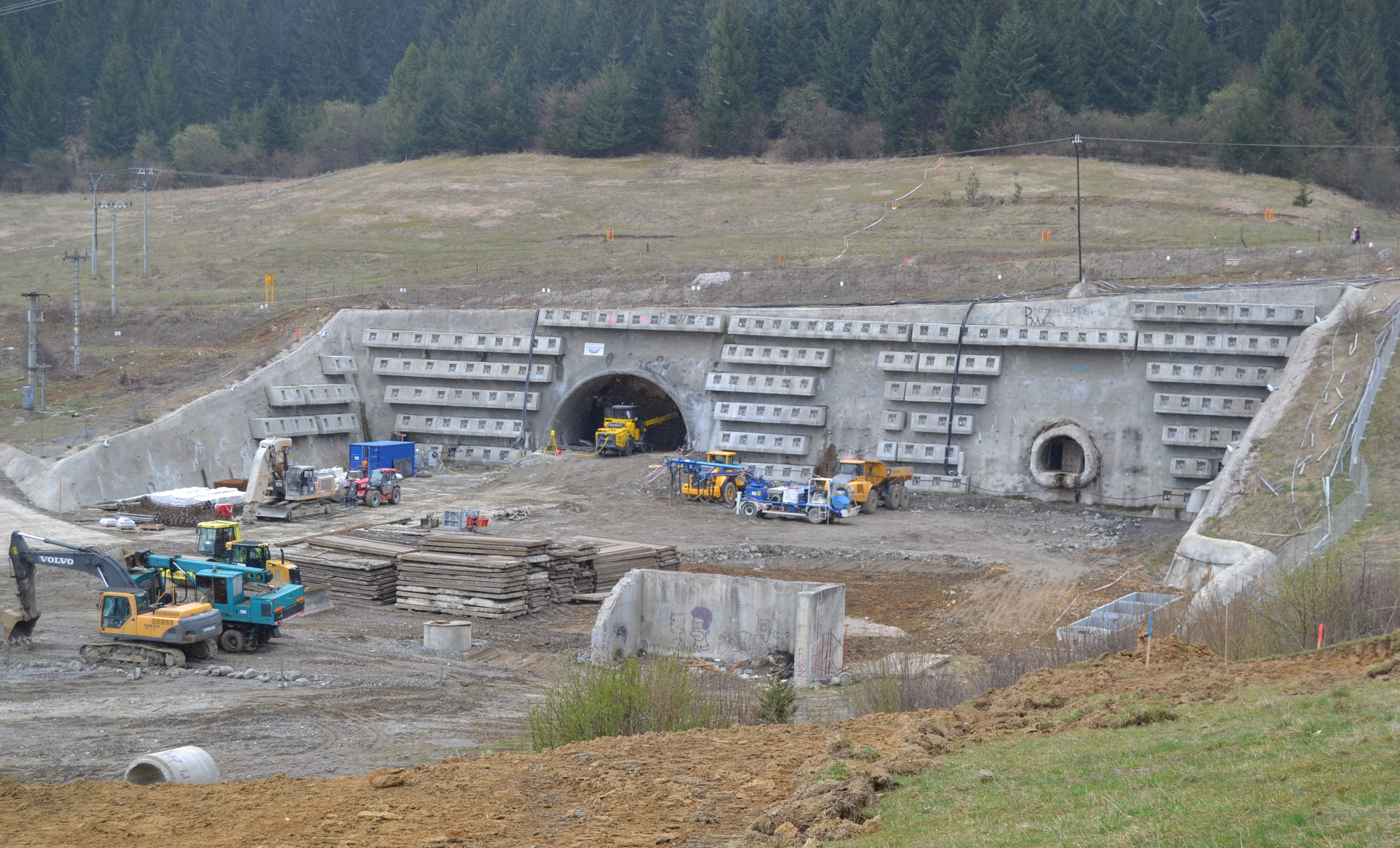 visnove